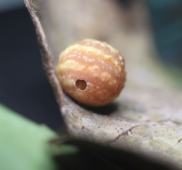 Gestreifte Eichengallwespe (Cynips longiventris); Galle mit Öffnung, aus welcher die Gallwespe am 23. November 2019 herausschlüpfte